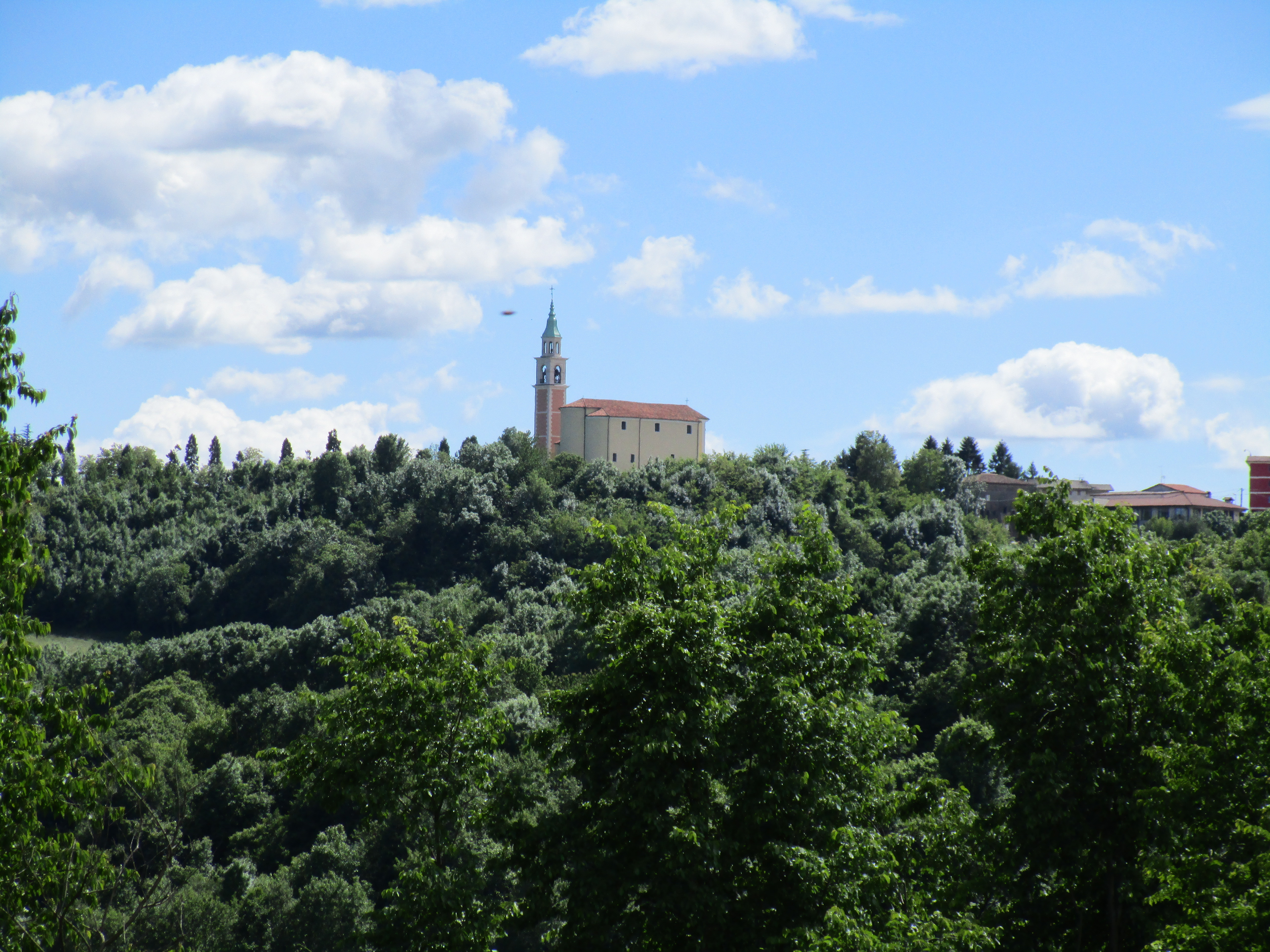 Trissino frazione Selva vista da Quarienta frazione di Brogliano